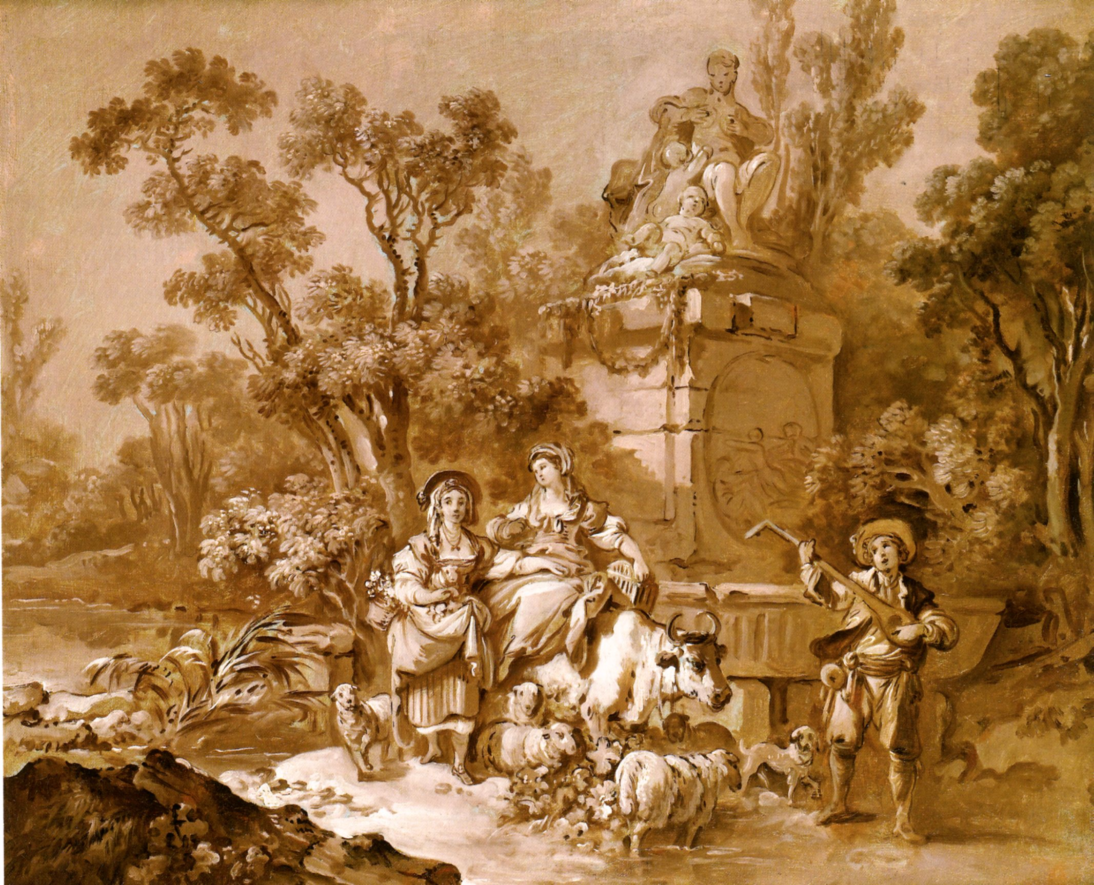 Bergères et musicien se reposant près d'un monument